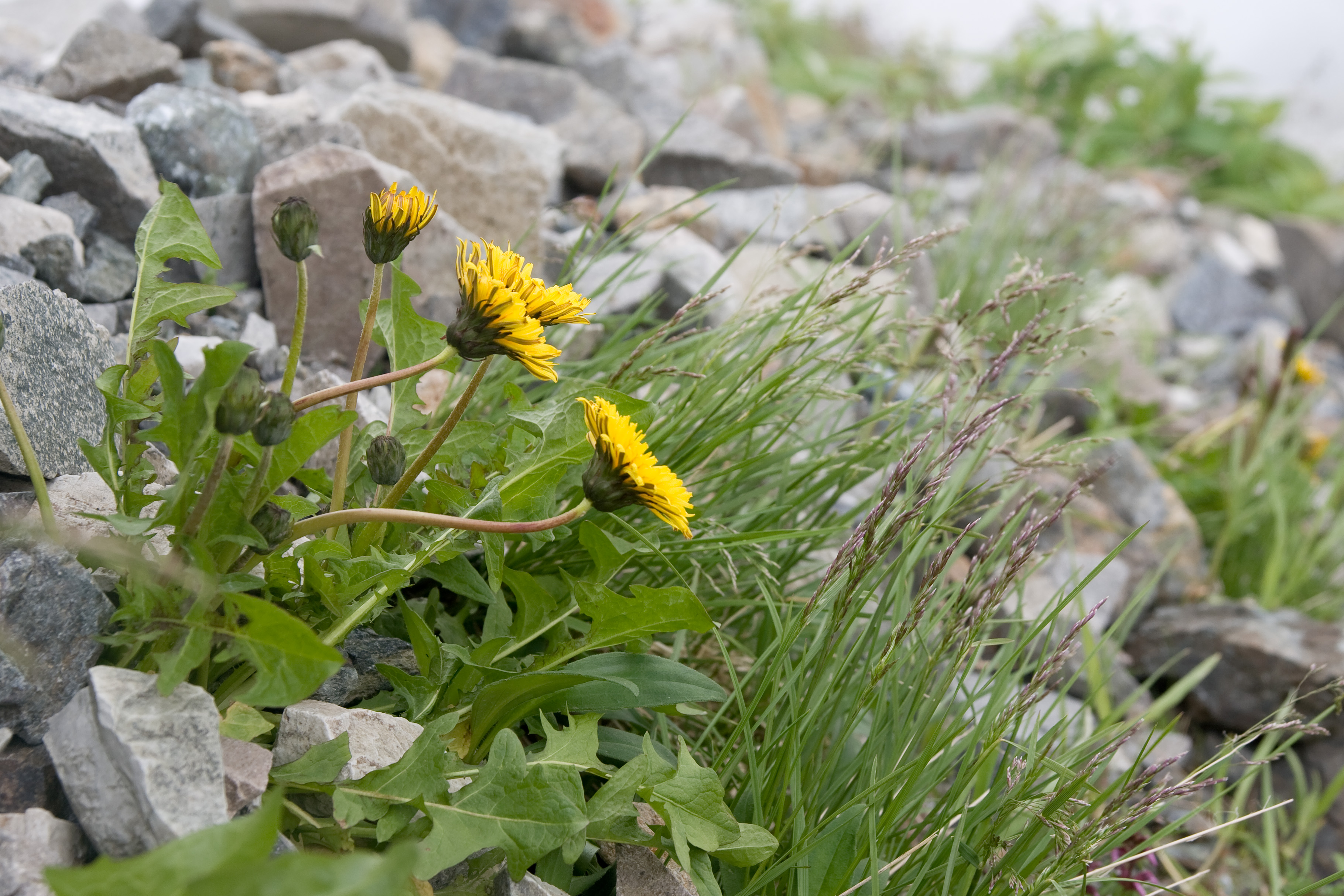 シロウマタンポポ (学名：Taraxacum alpicola var. shiroumense )